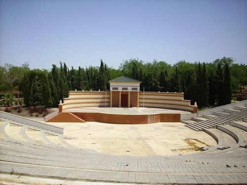 Teatro al estilo romano en Marinaleda